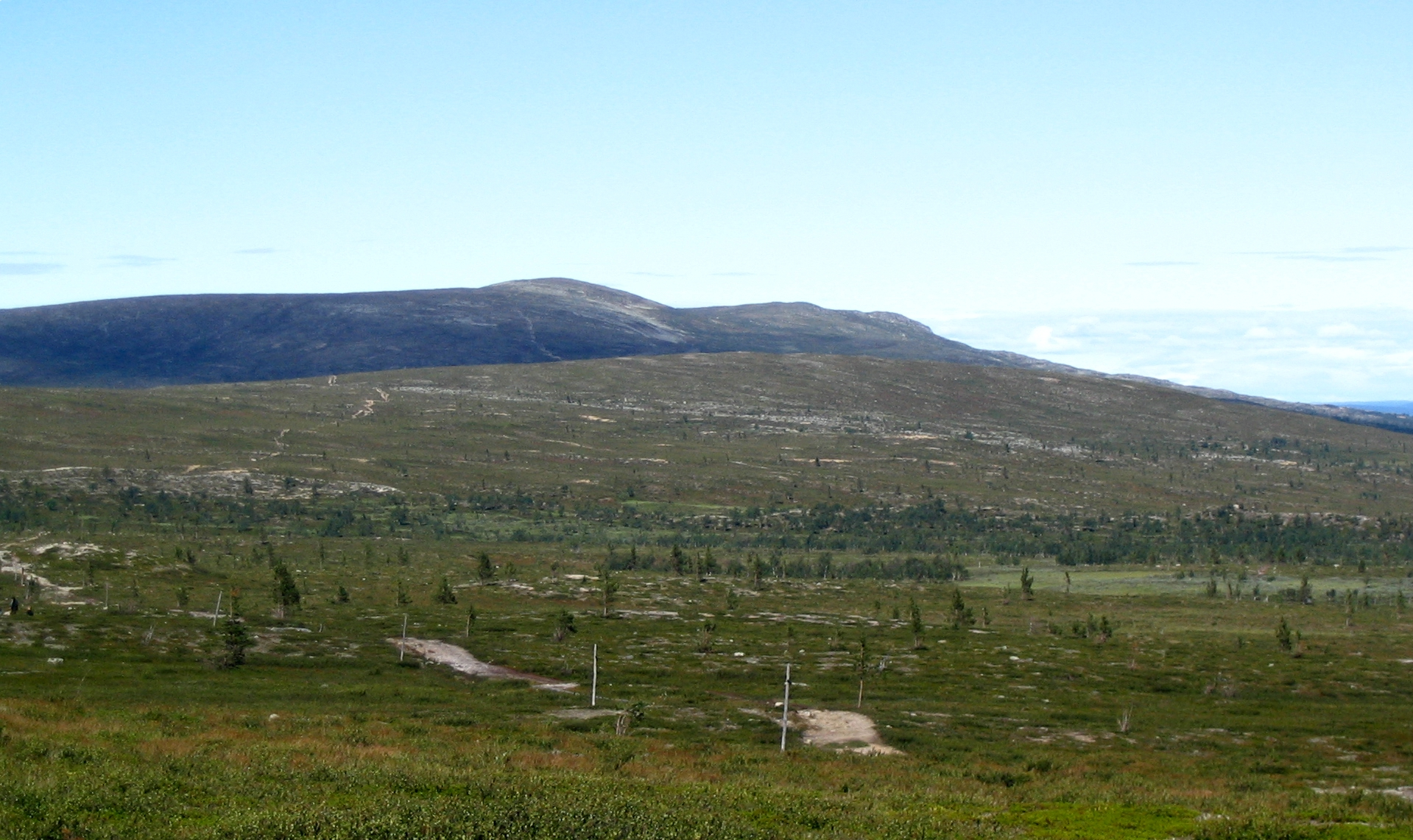 Vaelluspolkua Sioskuru–Pahakuru-välillä Hetta–Pallas-vaellusreitillä.